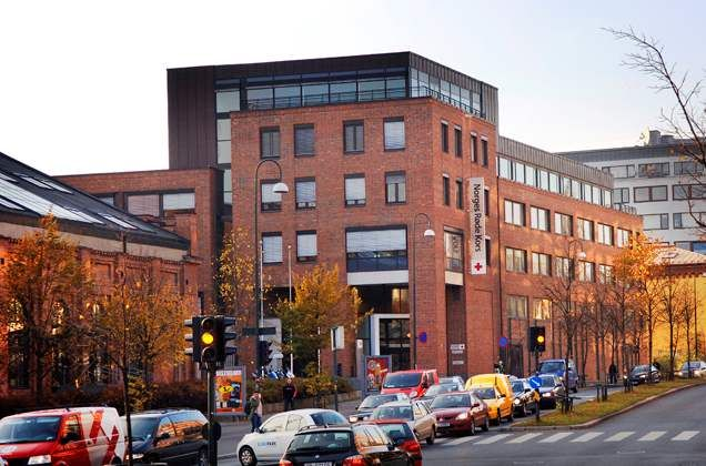 Norges Røde Kors sitt hovedkontor i Oslo